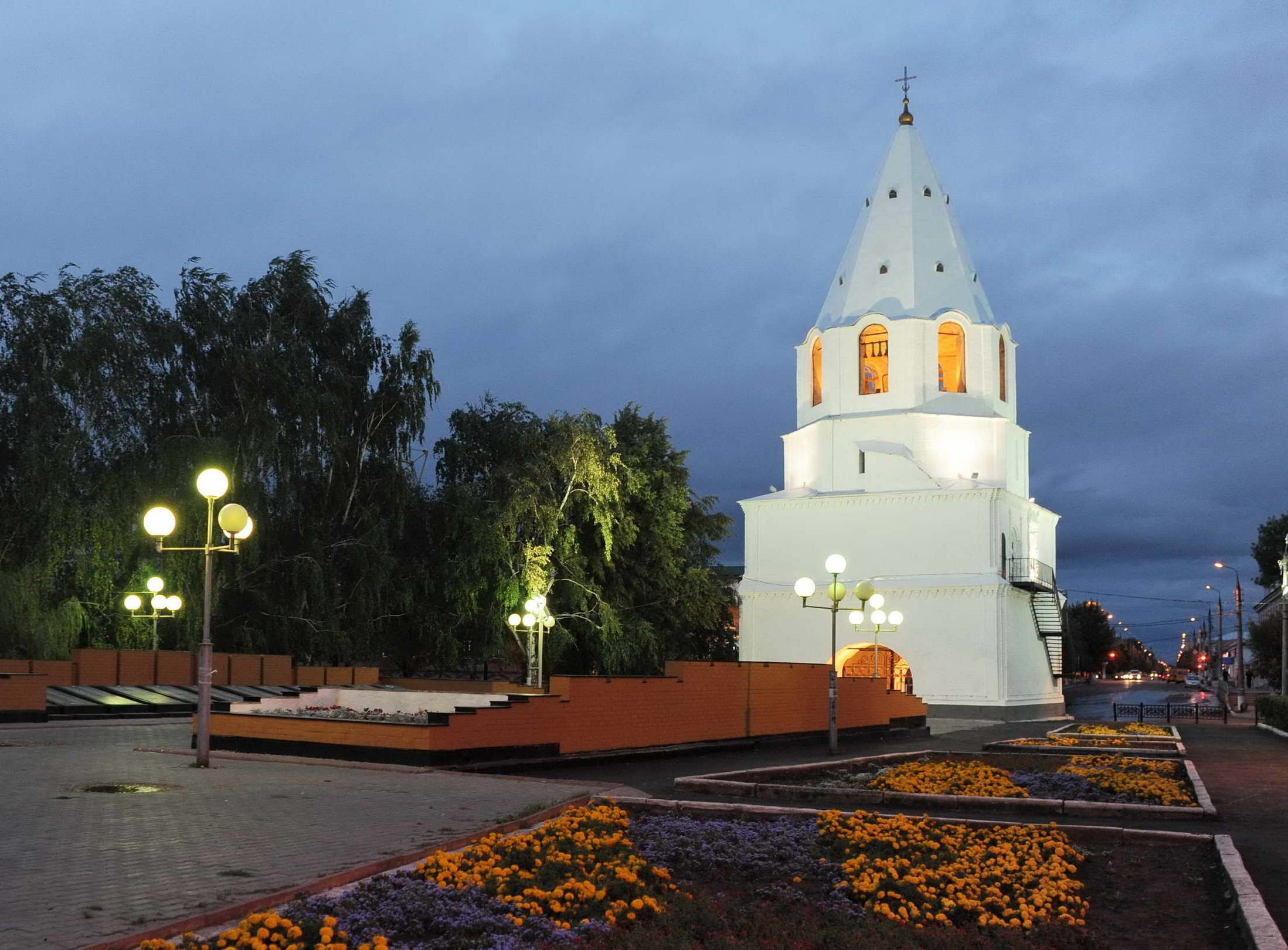 Спасская башня (1683). Она сначала была воротной башней, затем была переделана так, что внутри располагалась церковь во имя Спаса Нерукотворного.